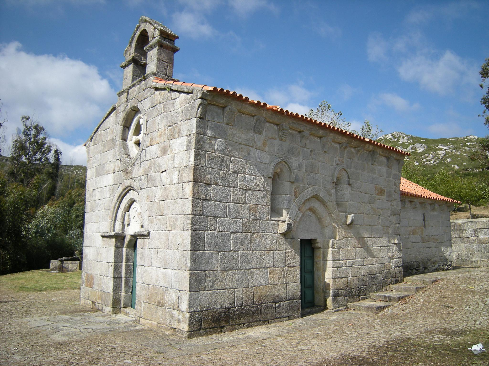 Iglesia románica edificada a finales del siglo XIII (Caminha - Portugal)